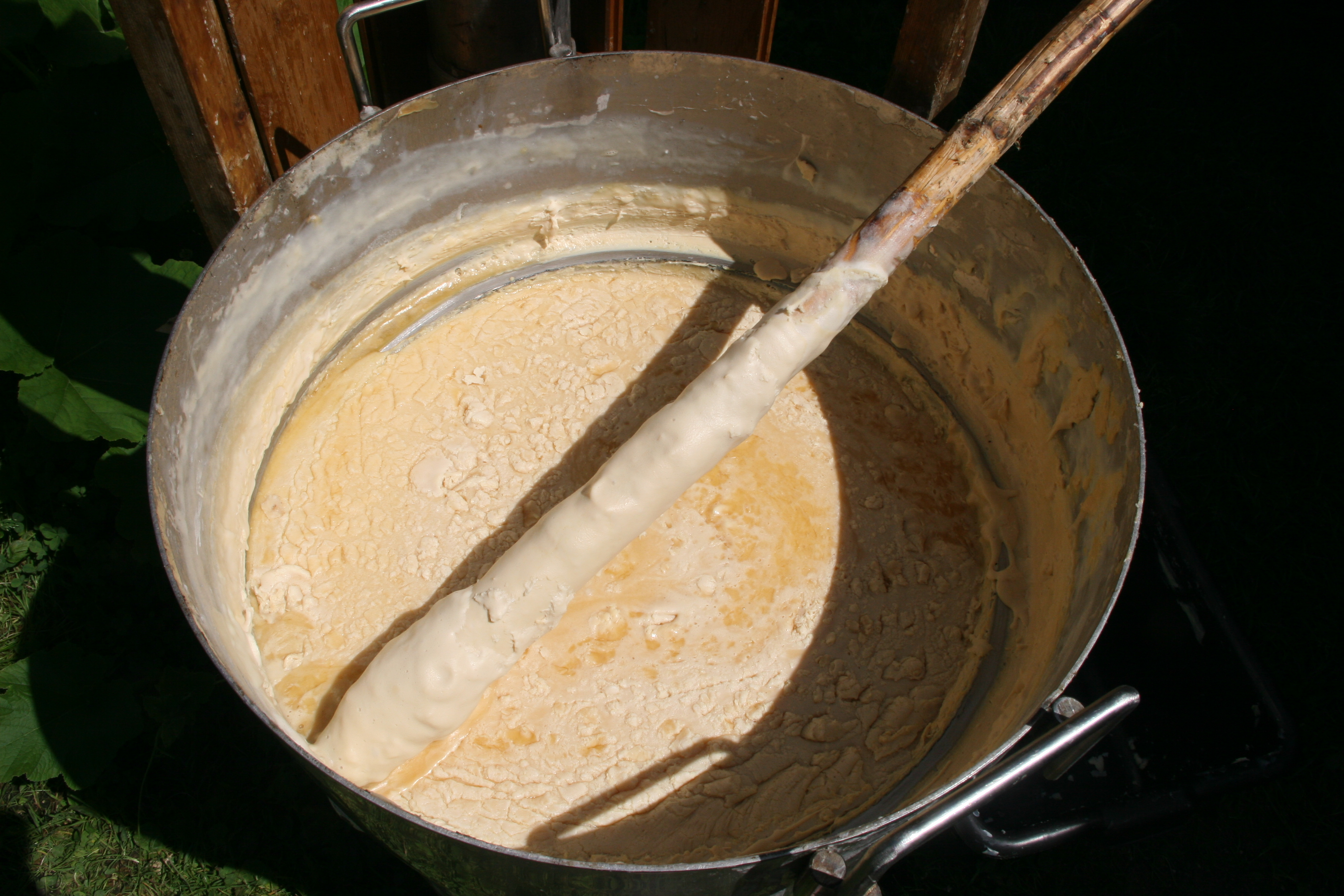 Seifenherstellung aus Schafsfett. Das Bild zeigt, wie die Seife (hier beim Abkühlen) früher hergestellt wurde.